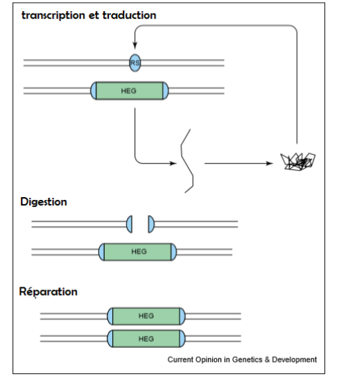 Schéma du mécanisme des HEGs